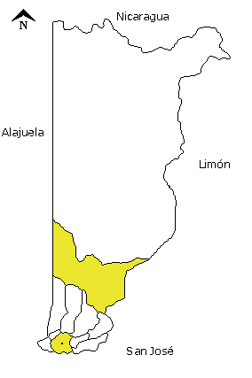 Mapa del cantón de Heredia, provincia de Heredia, Costa Rica